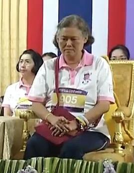 诗琳通公主，2019年2月10日。